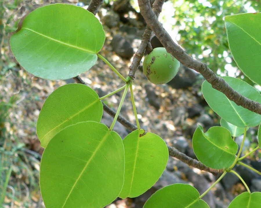 Hippomane mancinella, fruit